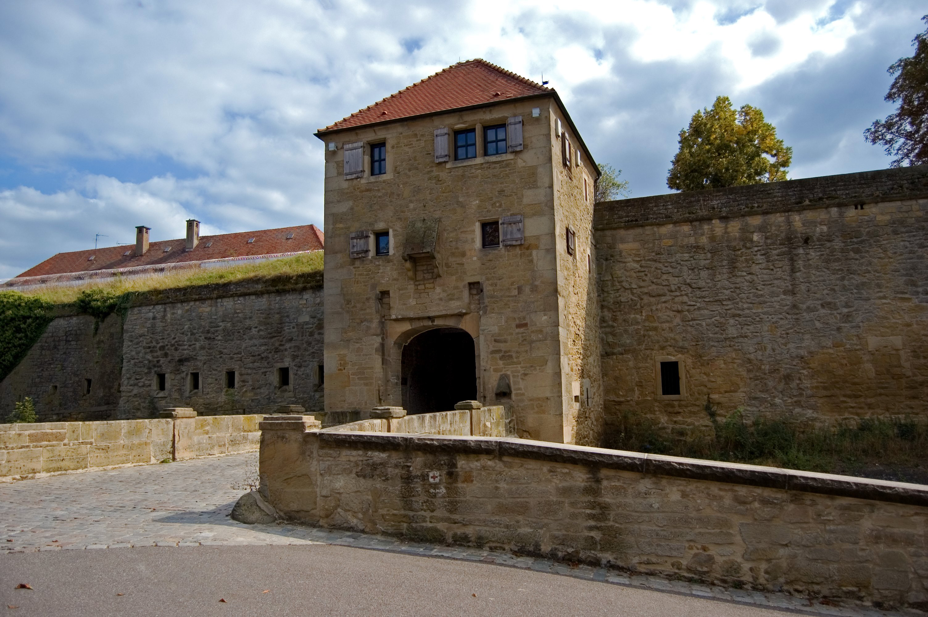 Festung Hohenasperg Justizvollzugskrankenhaus